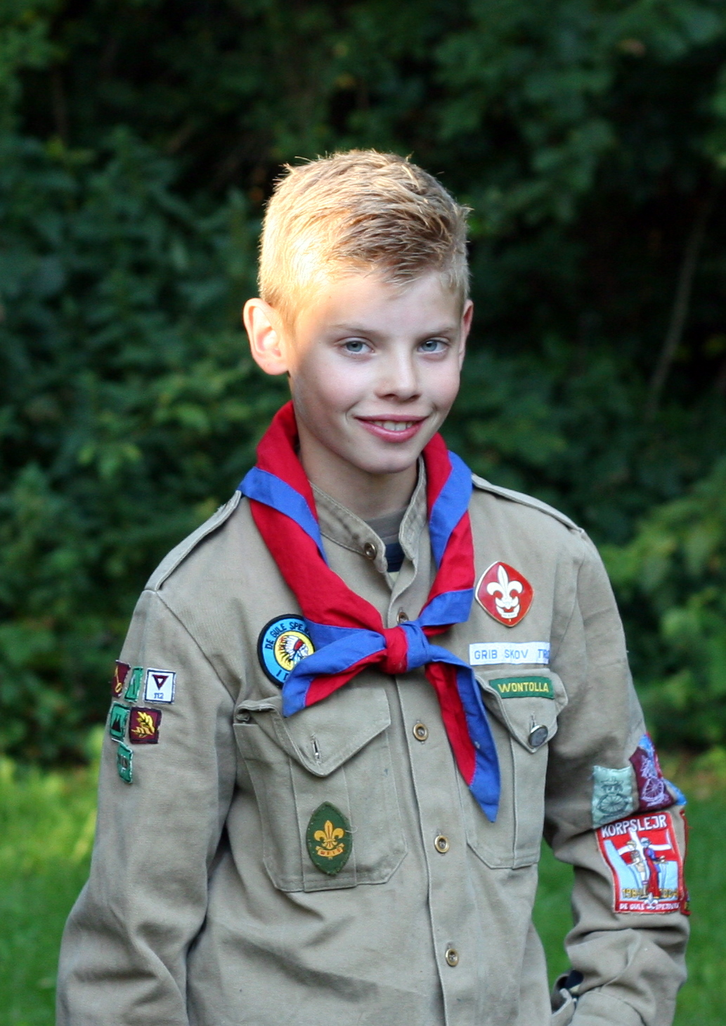 Gul Spejder, Stifinder. Foto Jim Michael Daae